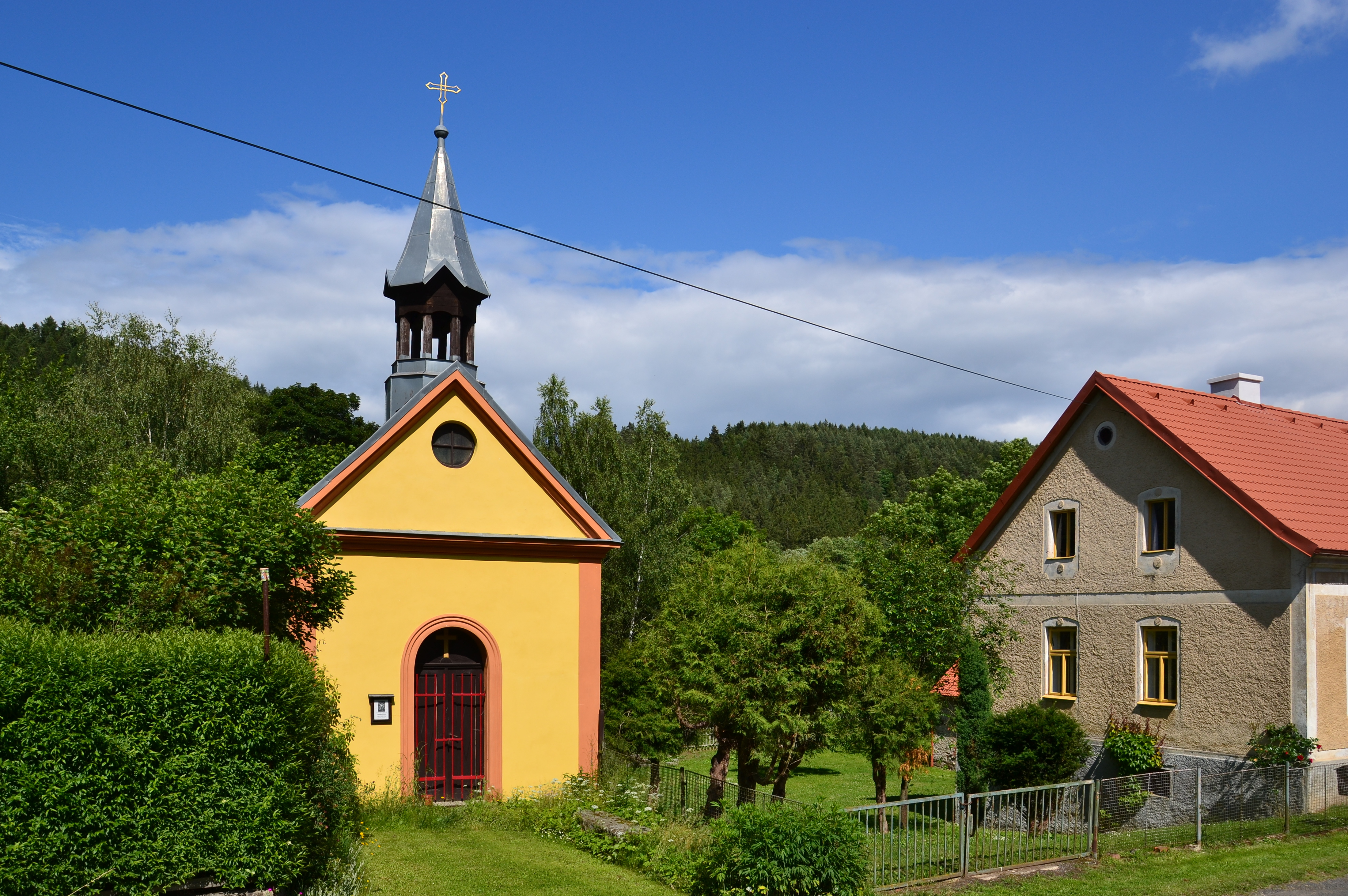 Kaple